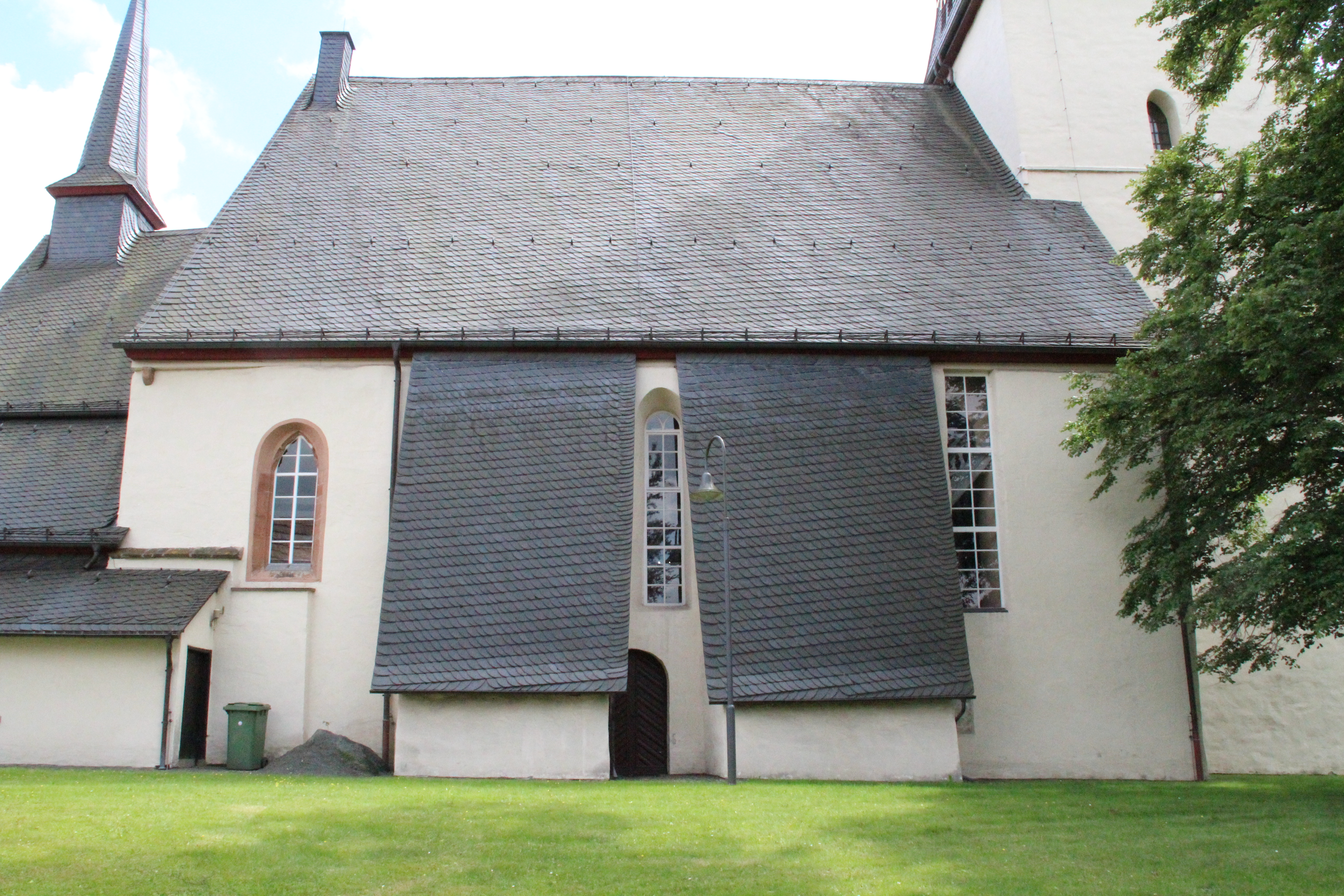 Evangelische Kirche Breidenbach, Landkreis Marburg-Biedenkopf, Hessen, Deutschland